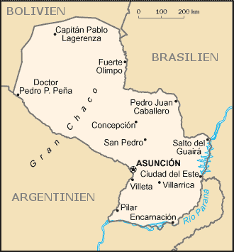 Landkarte Paraguays